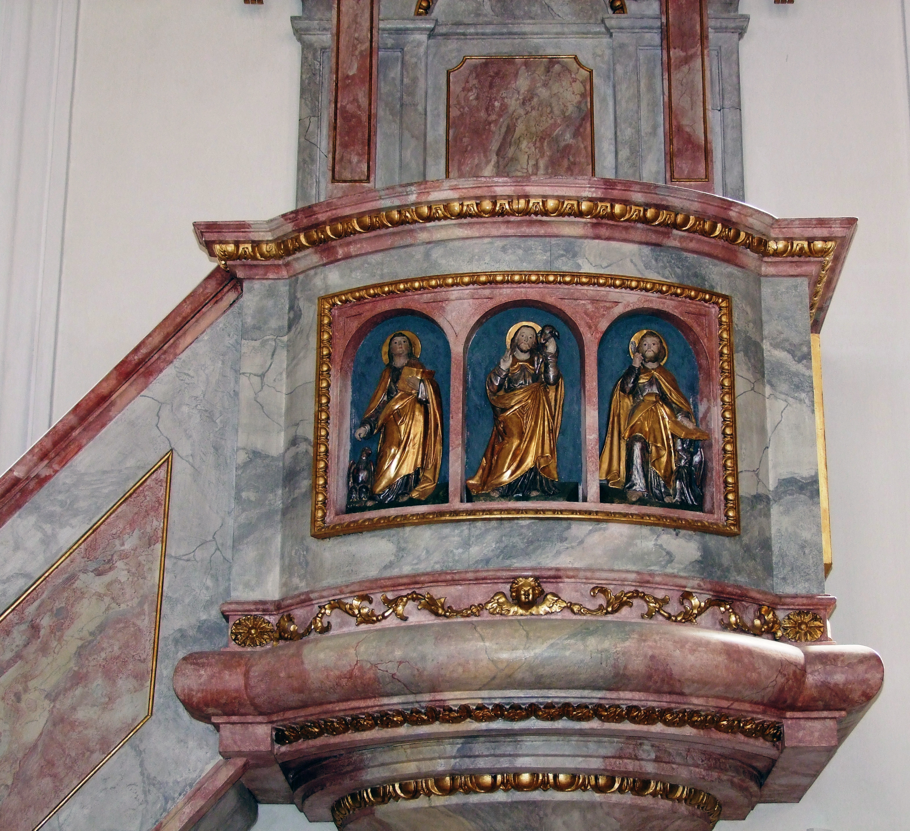 Mariä Himmelfahrt, Pfarrkirche im oberschwäbischen Illerbeuren bei Memmingen